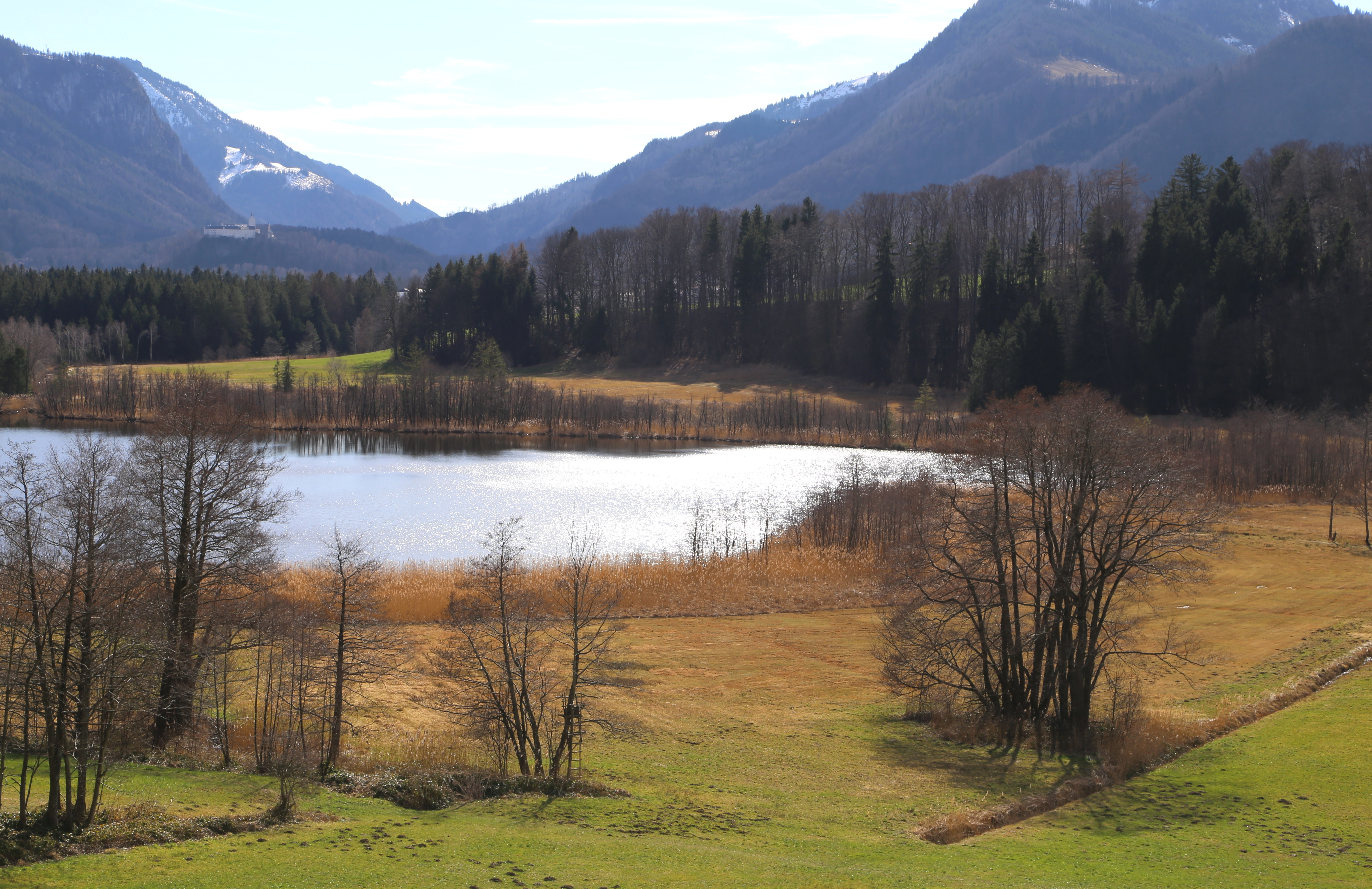 Bärnsee, Aschau im Chiemgau Landschaftsschutzgebiet „Inschutznahme des Bärnsees und seiner Umgebung als LSG“, LSG-00144.01